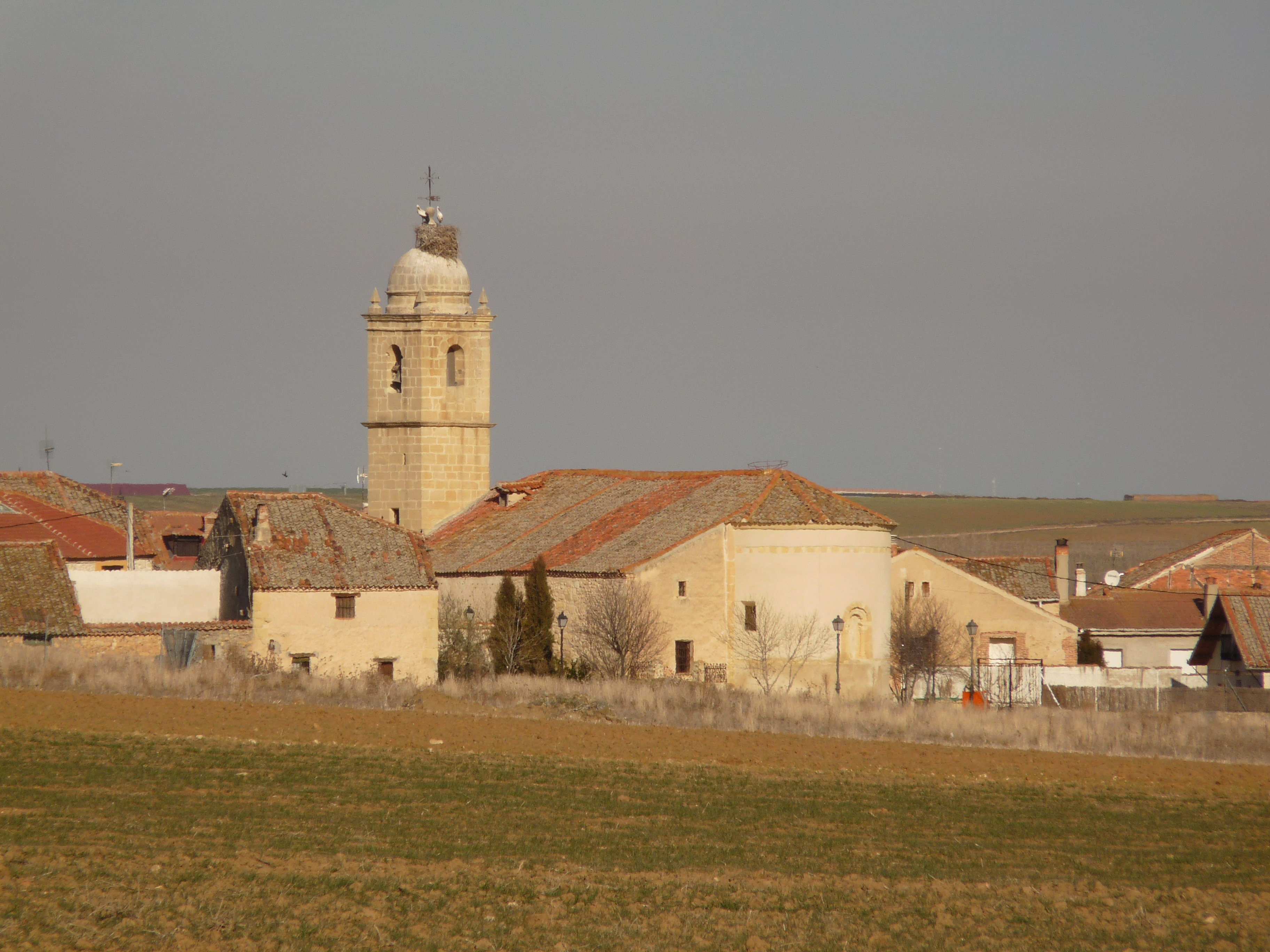 Encinillas